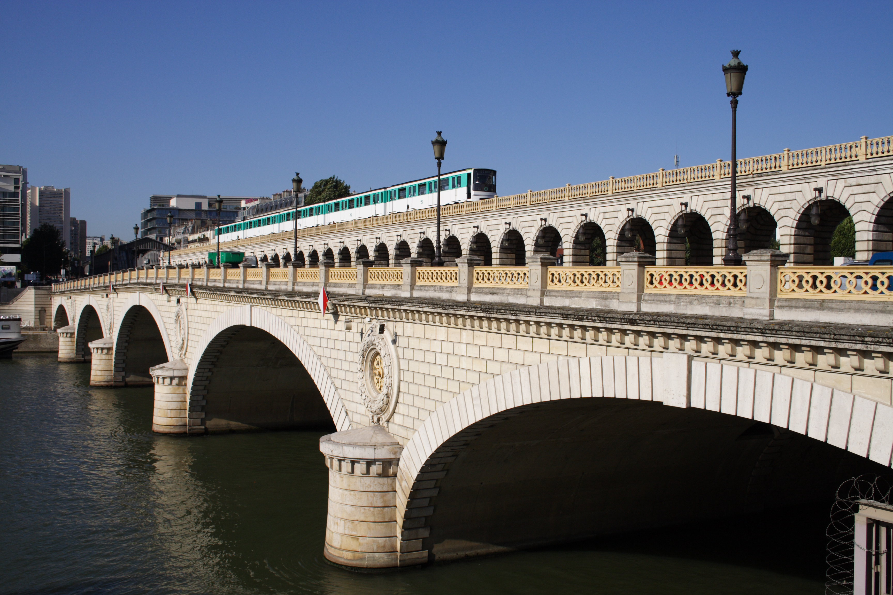 Pont de Bercy(Paris, France)